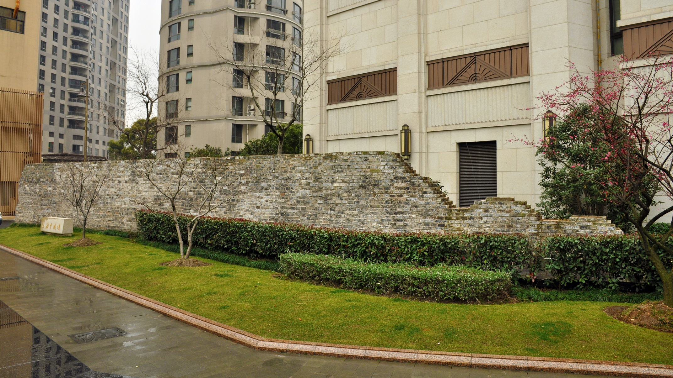 露香园路城墙 明 豫园街道